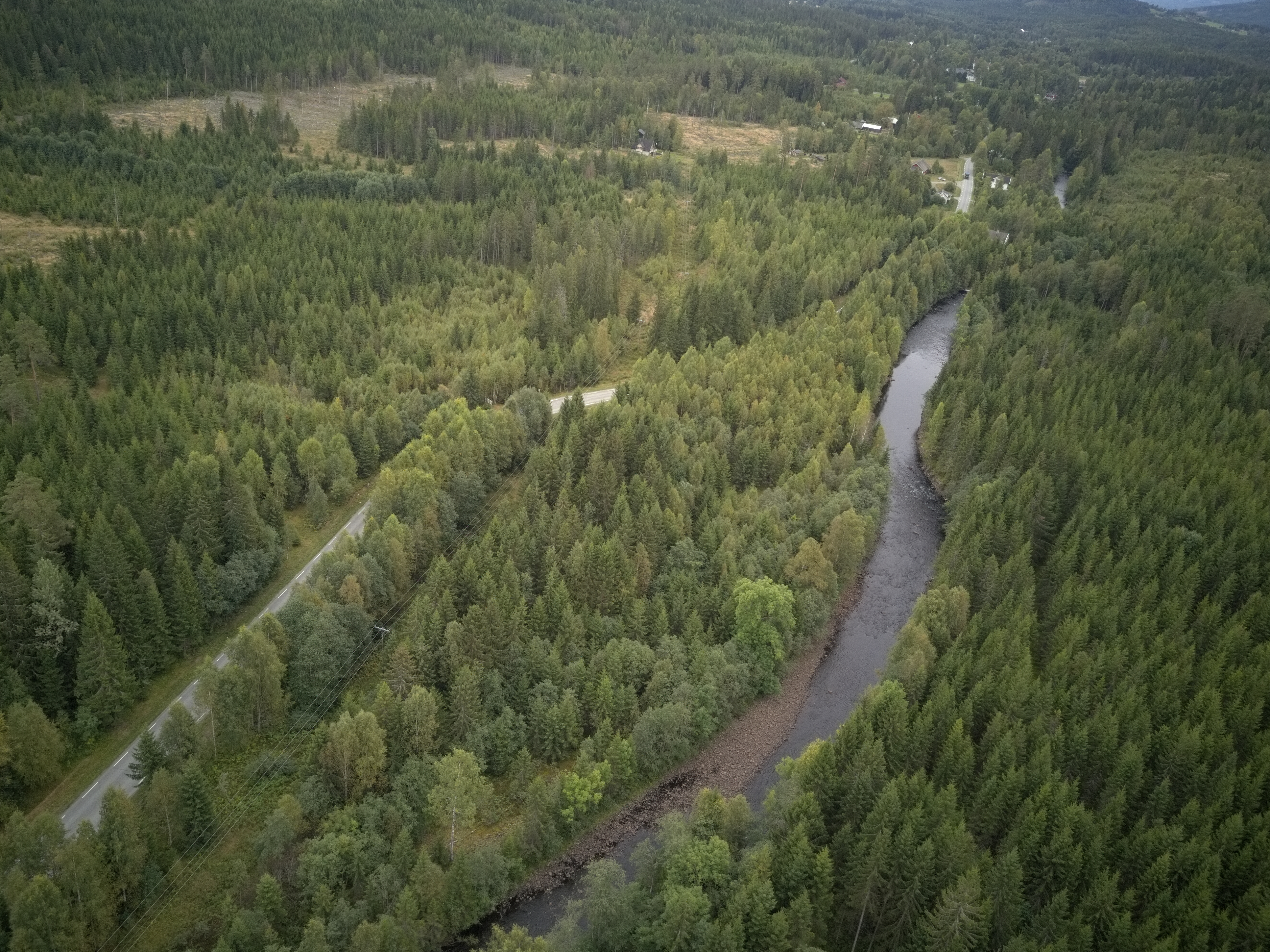 Hurdalselva